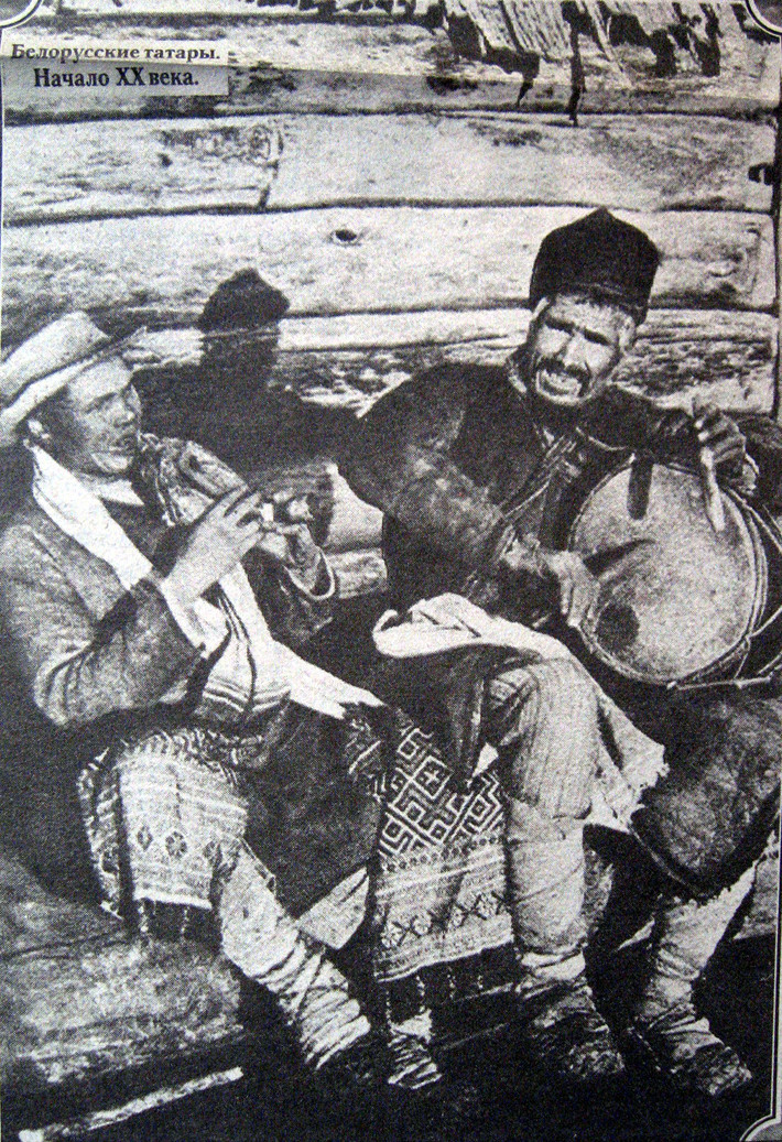 Беларускія татары